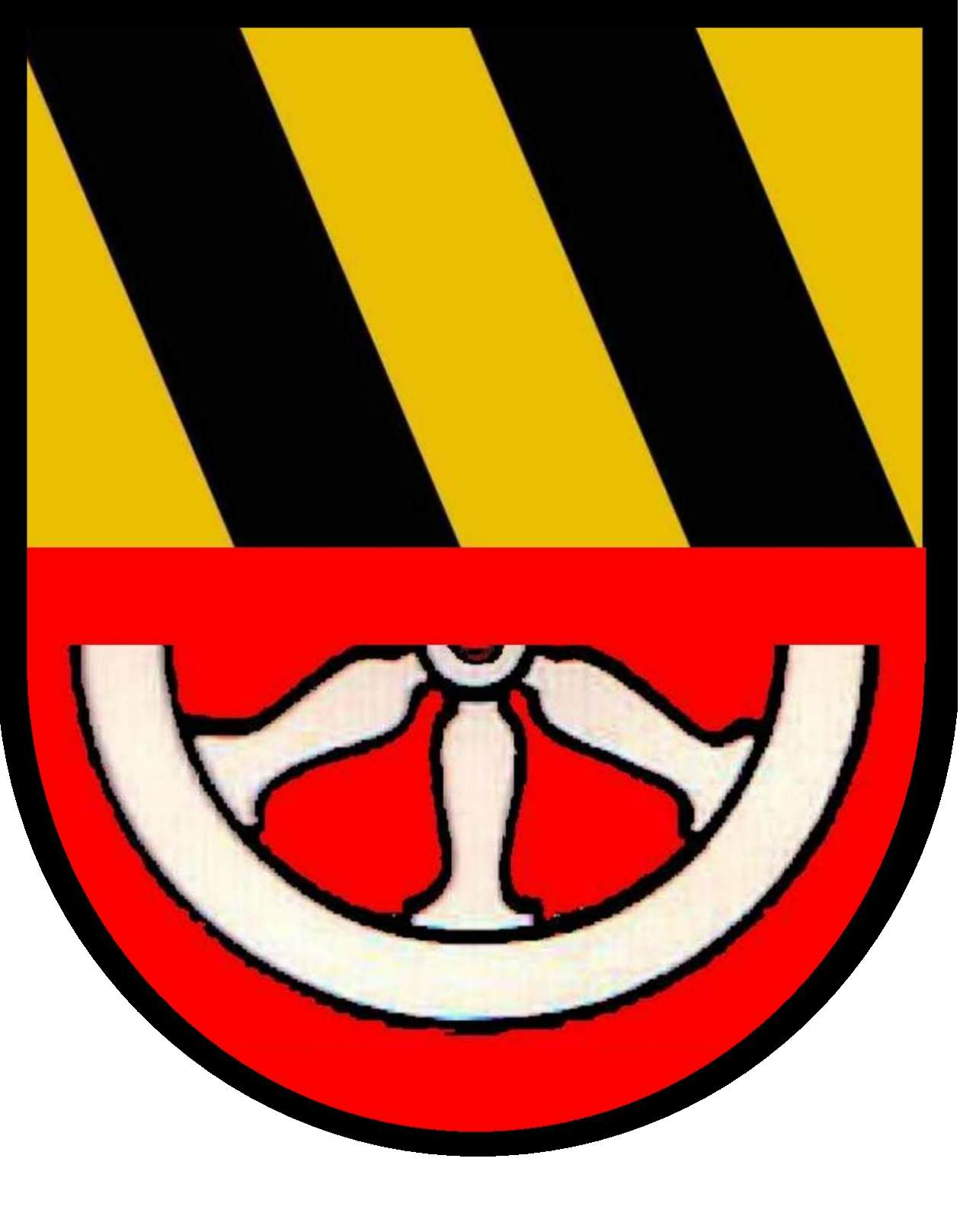 Wappen der Familie von Weber, geteilt, oben in Gold zwei schwarze Schrägbalken, unten in Rot unterhalbes weiß/silbernes Rad (Mainzer Rad)